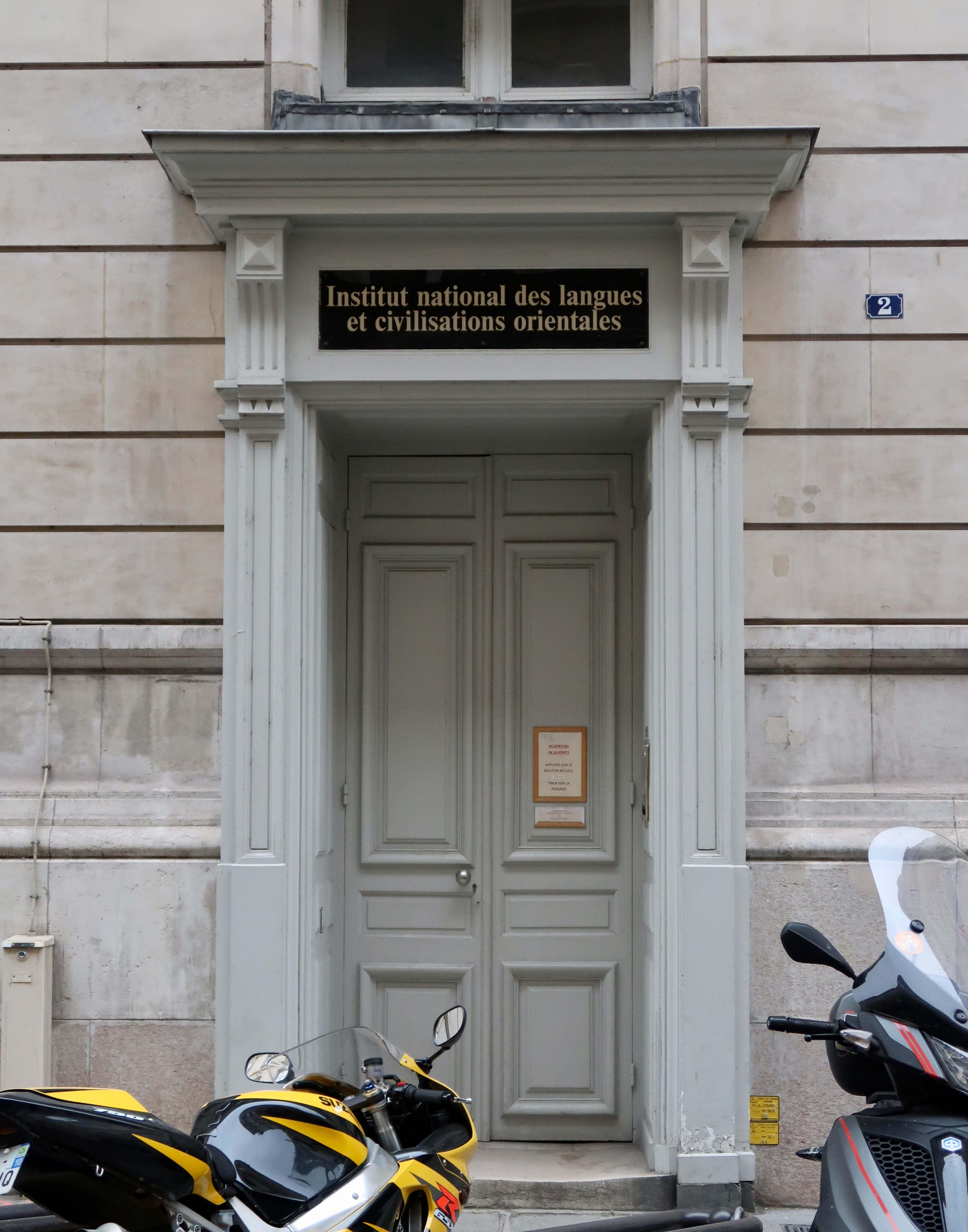 Institut national des langues et civilisations orientales (INALCO), 2 rue de Lille (Paris, 7e).